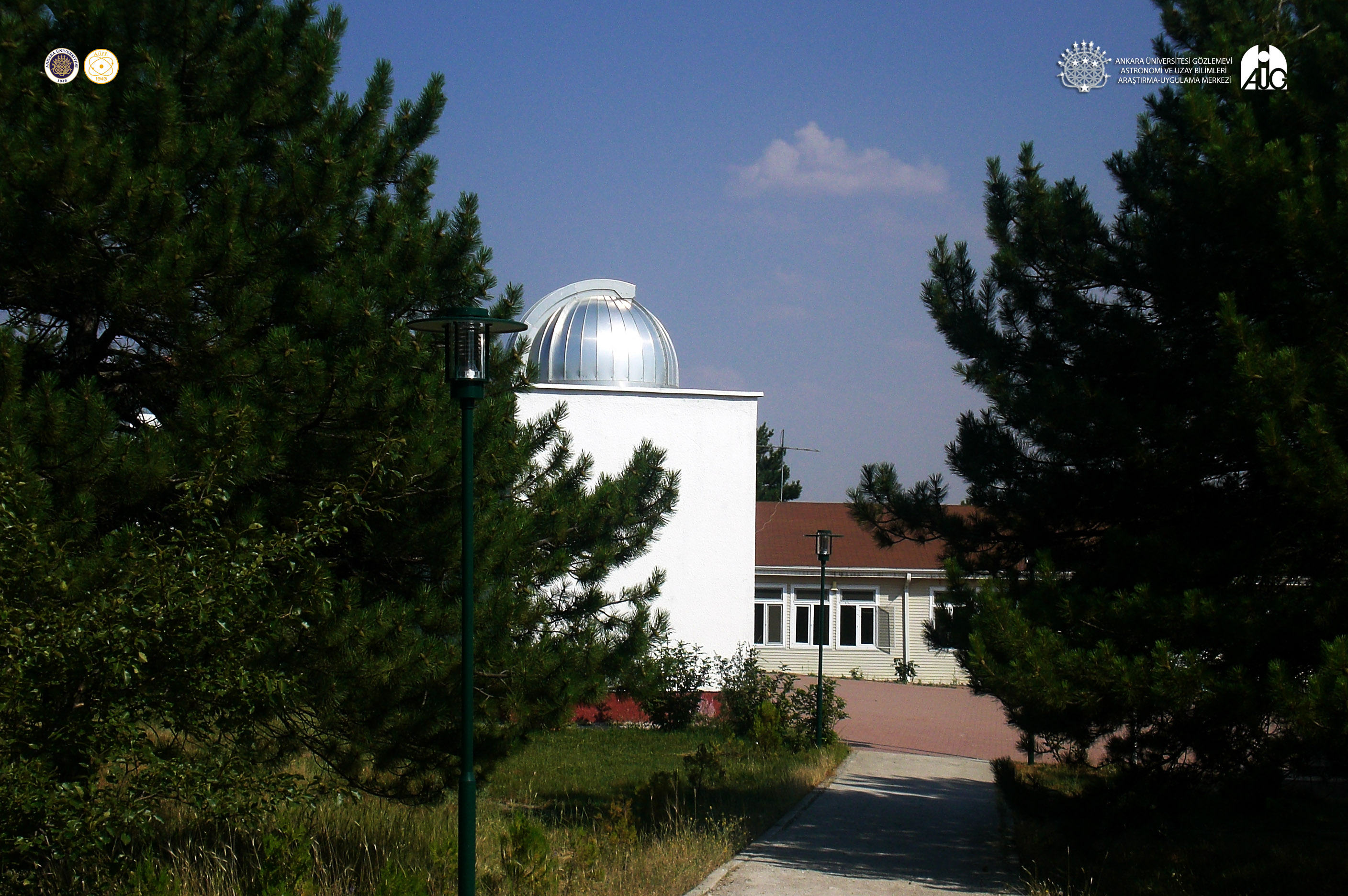 AUG T35 Teleskop Binası